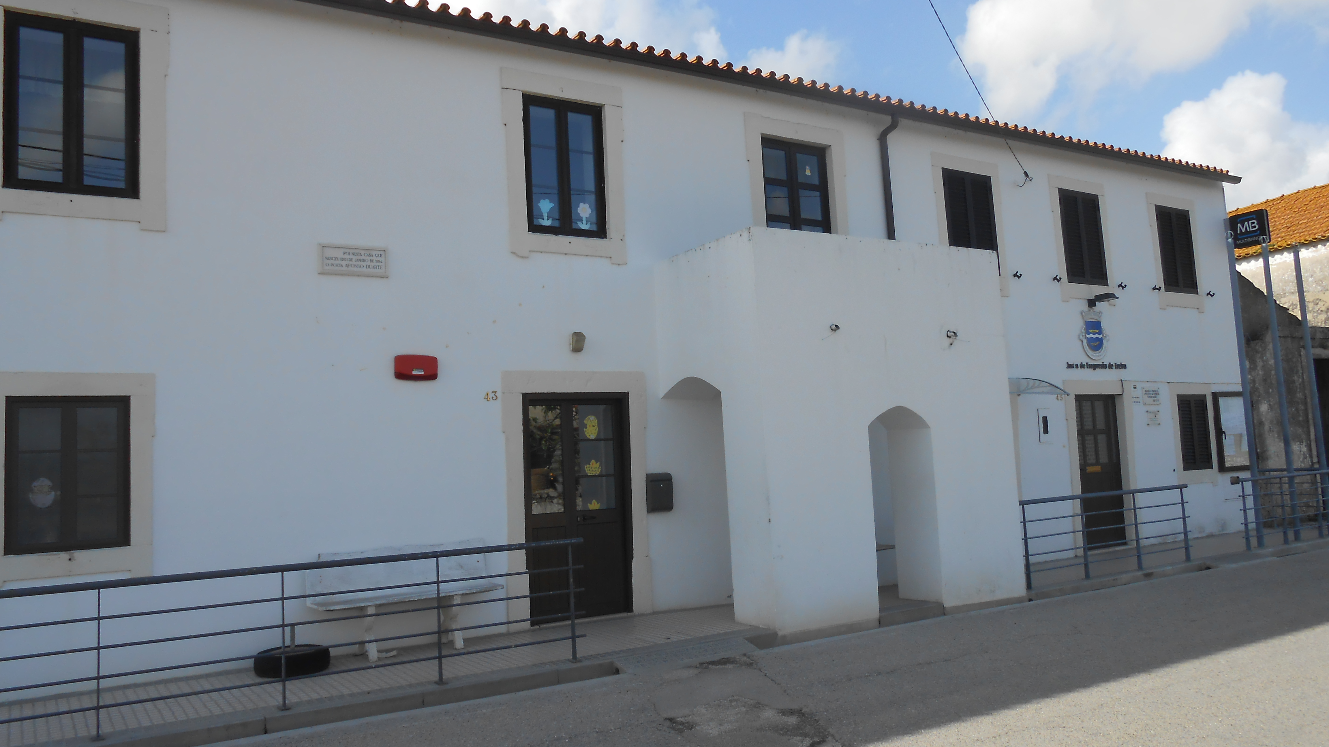 Das Geburtshaus des Schriftstellers Afonso Duarte mit der Gemeindeverwaltung (Junta de Freguesia)